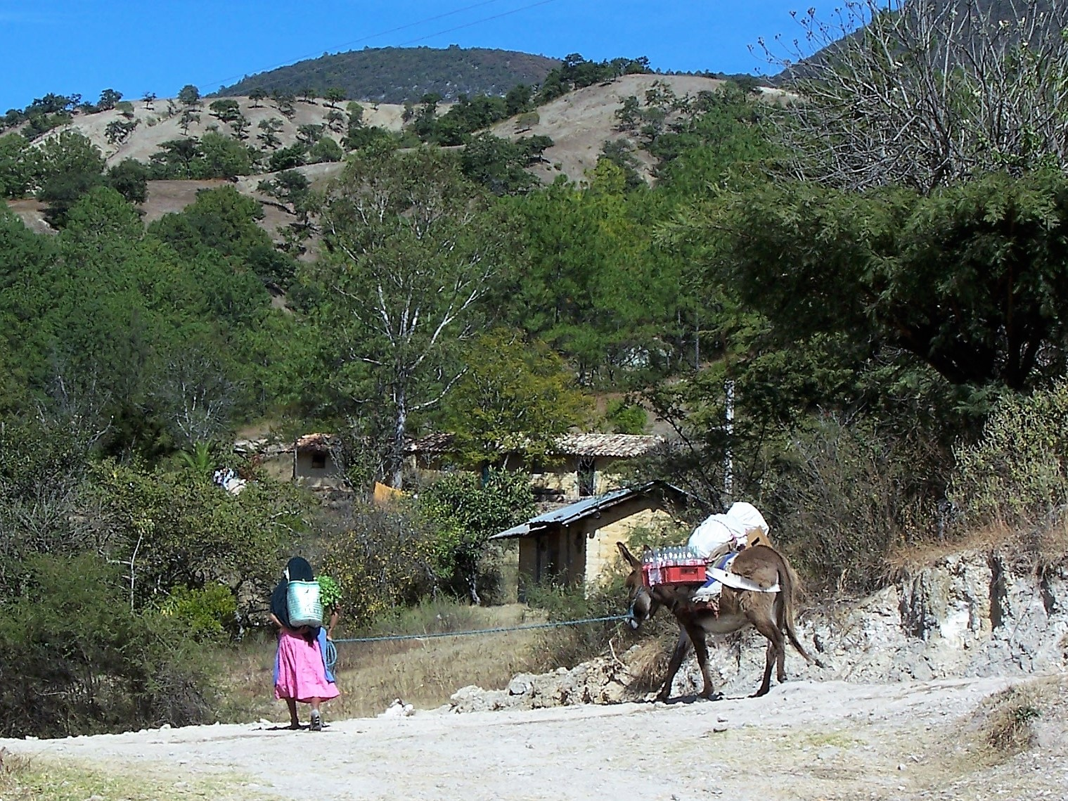 Dirigiéndose de Jatation a la fiesta patronal en San Juan Achiutla, Oaxaca, México. Diciembre 2009.